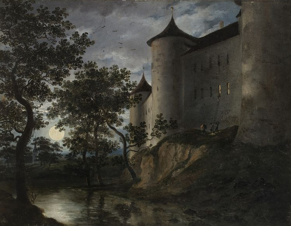 Johann Christian Reinhart: Der sächsische Prinzenraub (auch: Altenburger Prinzenraub). Öl auf Bütten,1785. 36,5 x 46,5 cm